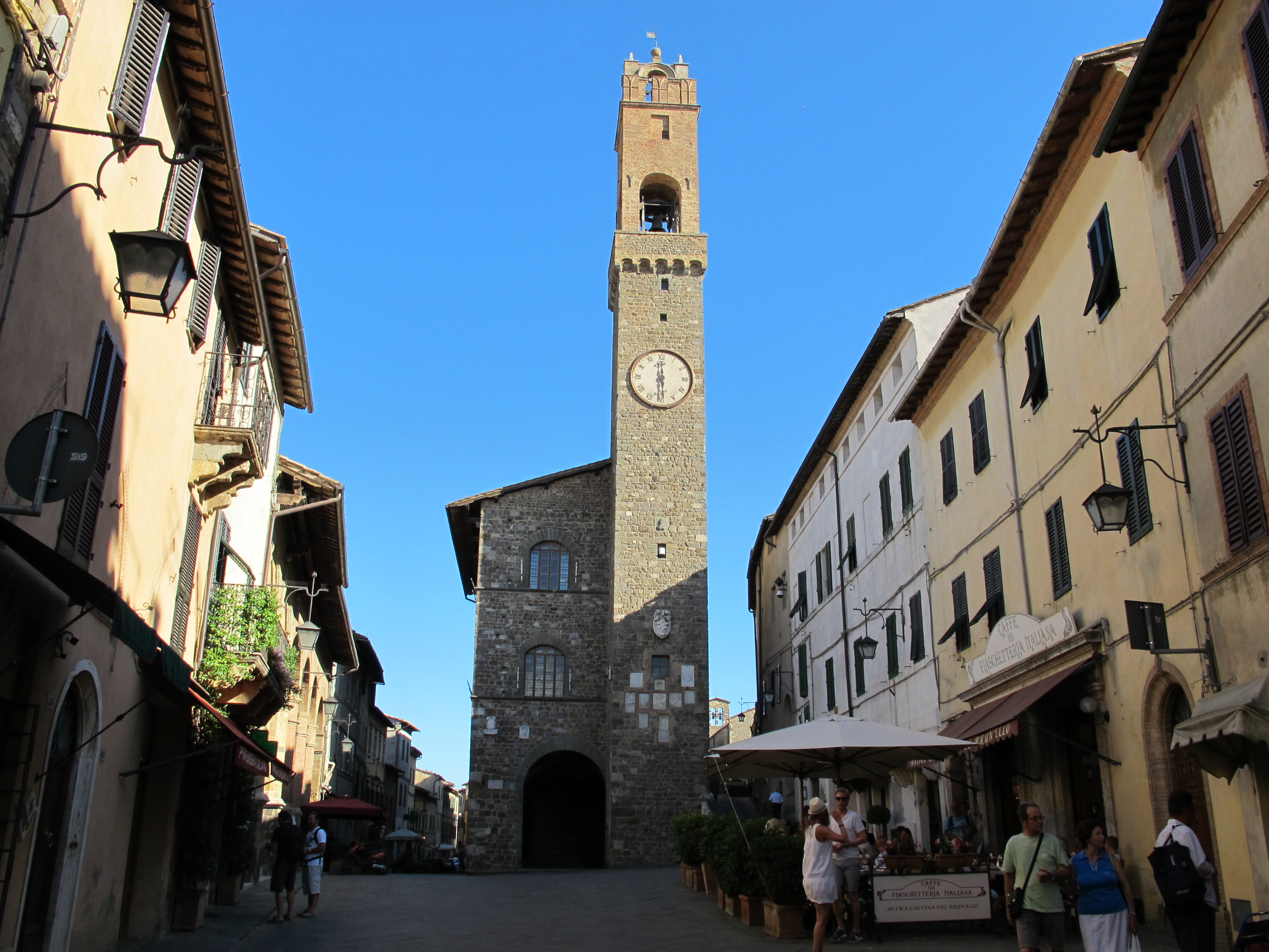 Montalcino, piazza del popolo e palazzo dei priori